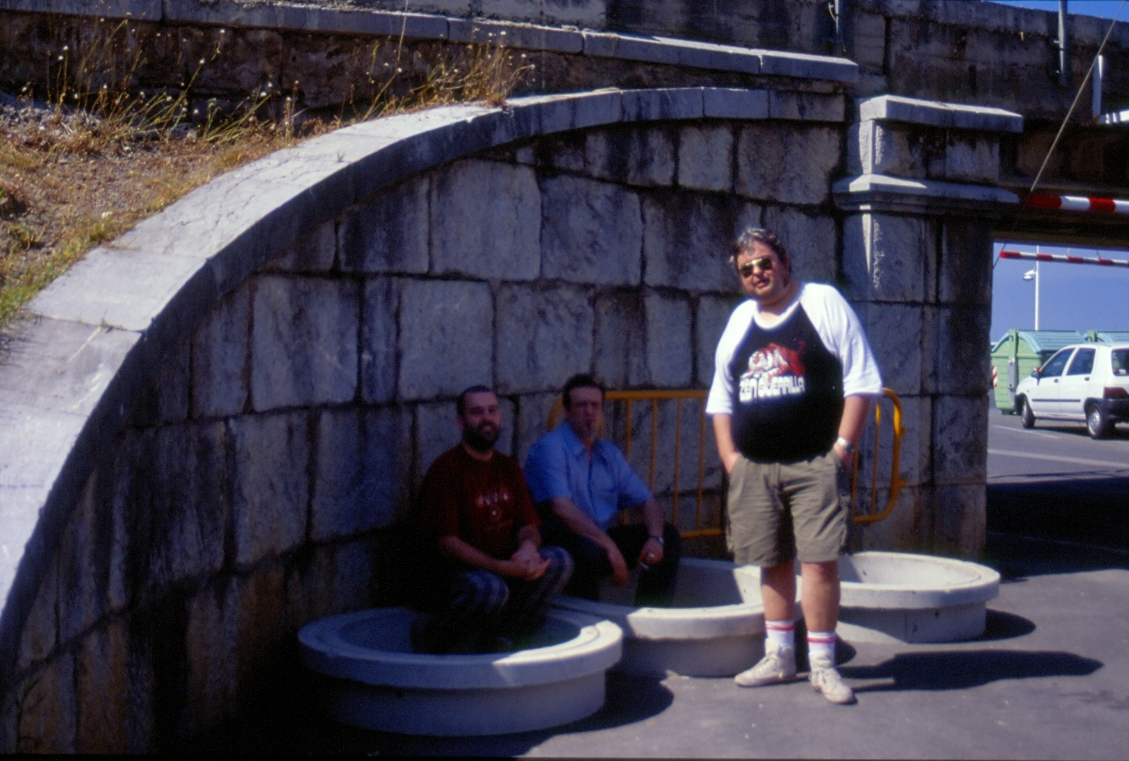 Kike Turmix (a la derecha) en Deba (Gipuzkoa), con compañeros del foro de internet "Diáspora Vasca".